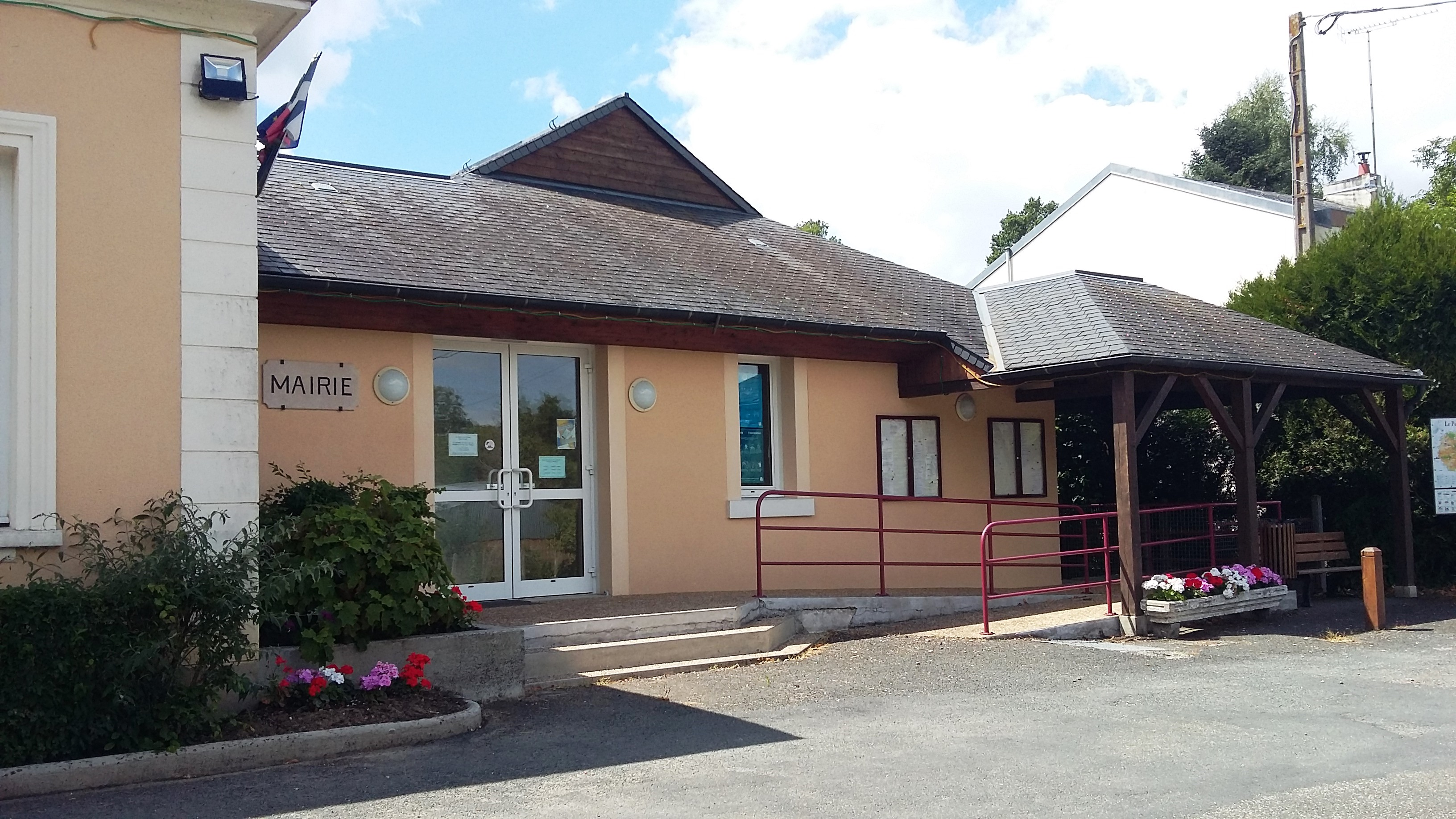 Saint-Jean-Pierre-Fixte - Mairie